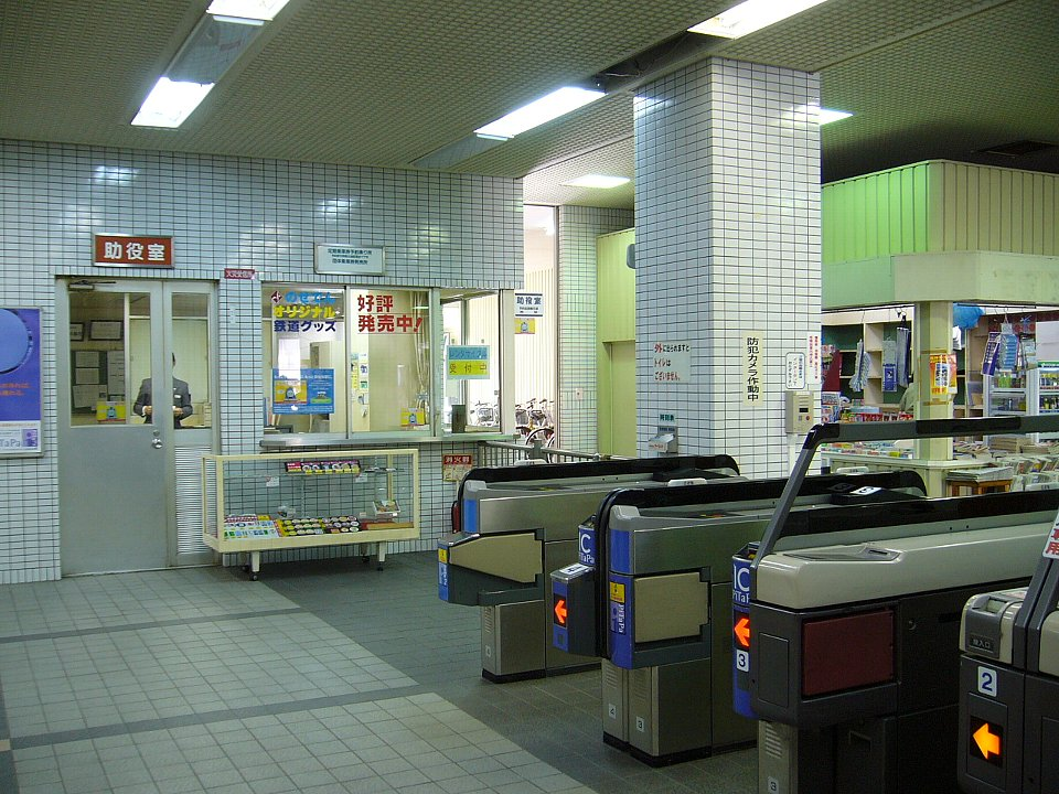 能勢電鉄山下駅 改札口と助役室